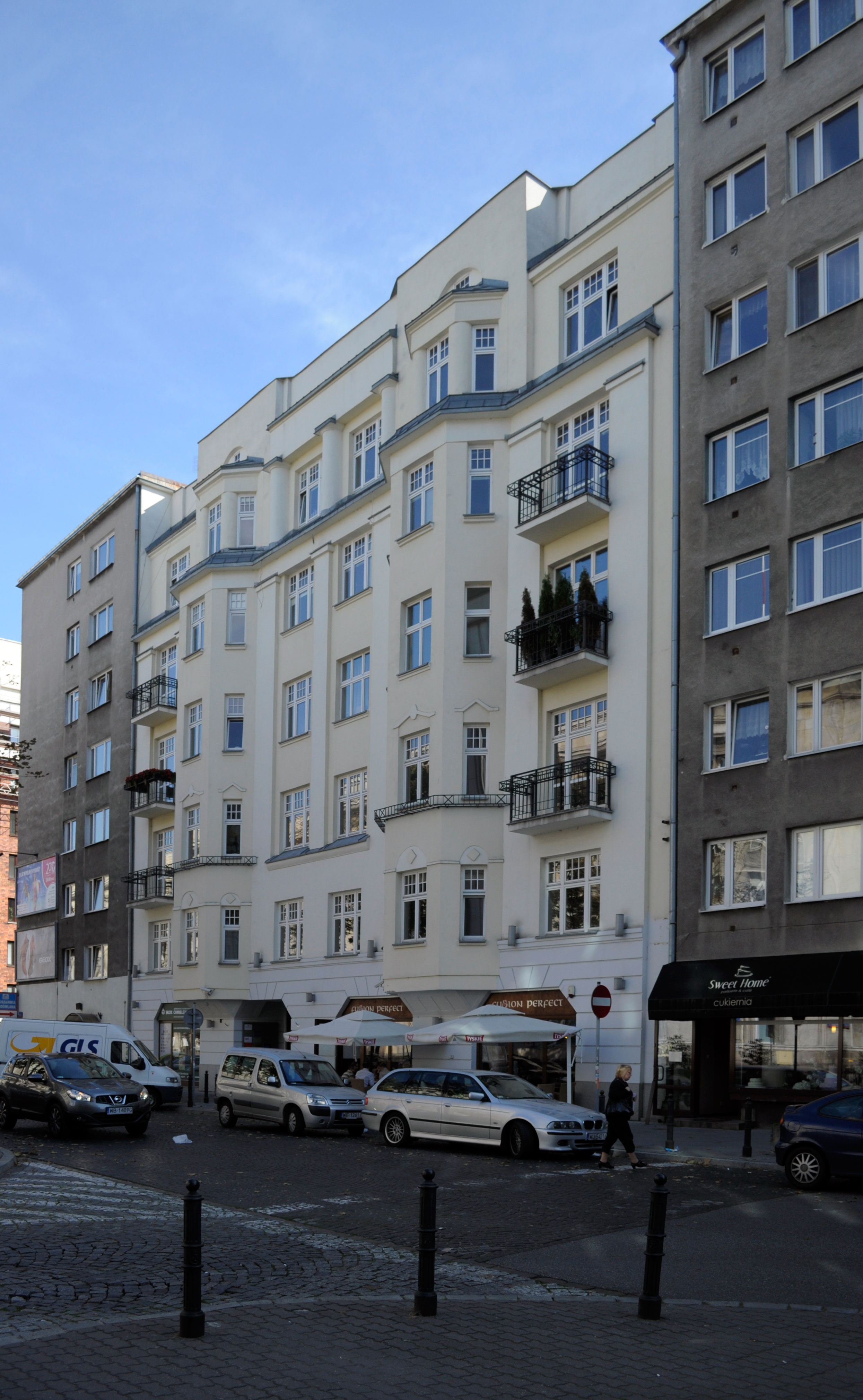 Warszawa, ul. Wspólna 35 - kamienica (zabytek nr A-844 z 26.03.2009)